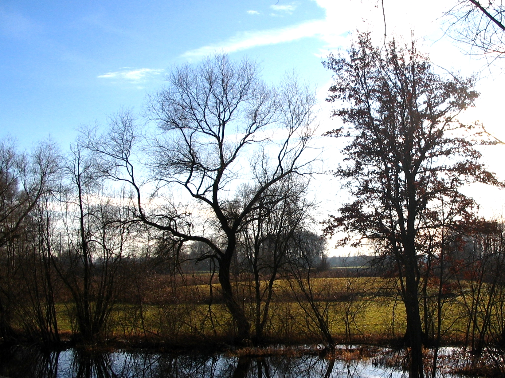 Verbliebener Burgstall der Burg Wöhr im Naturschutzgebiet Goldau, Neustadt an der Donau, Landkreis Kelheim, Niederbayern: Wöhr war hochmittelalterlicher Stammsitz des Adelsgeschlechts der Herrn von Wöhr sowie des herzoglichen Urbaramtes „ze Werde“ von dem aus Natural- und Geldabgaben aus herzoglichen Gütern verwaltet wurden.